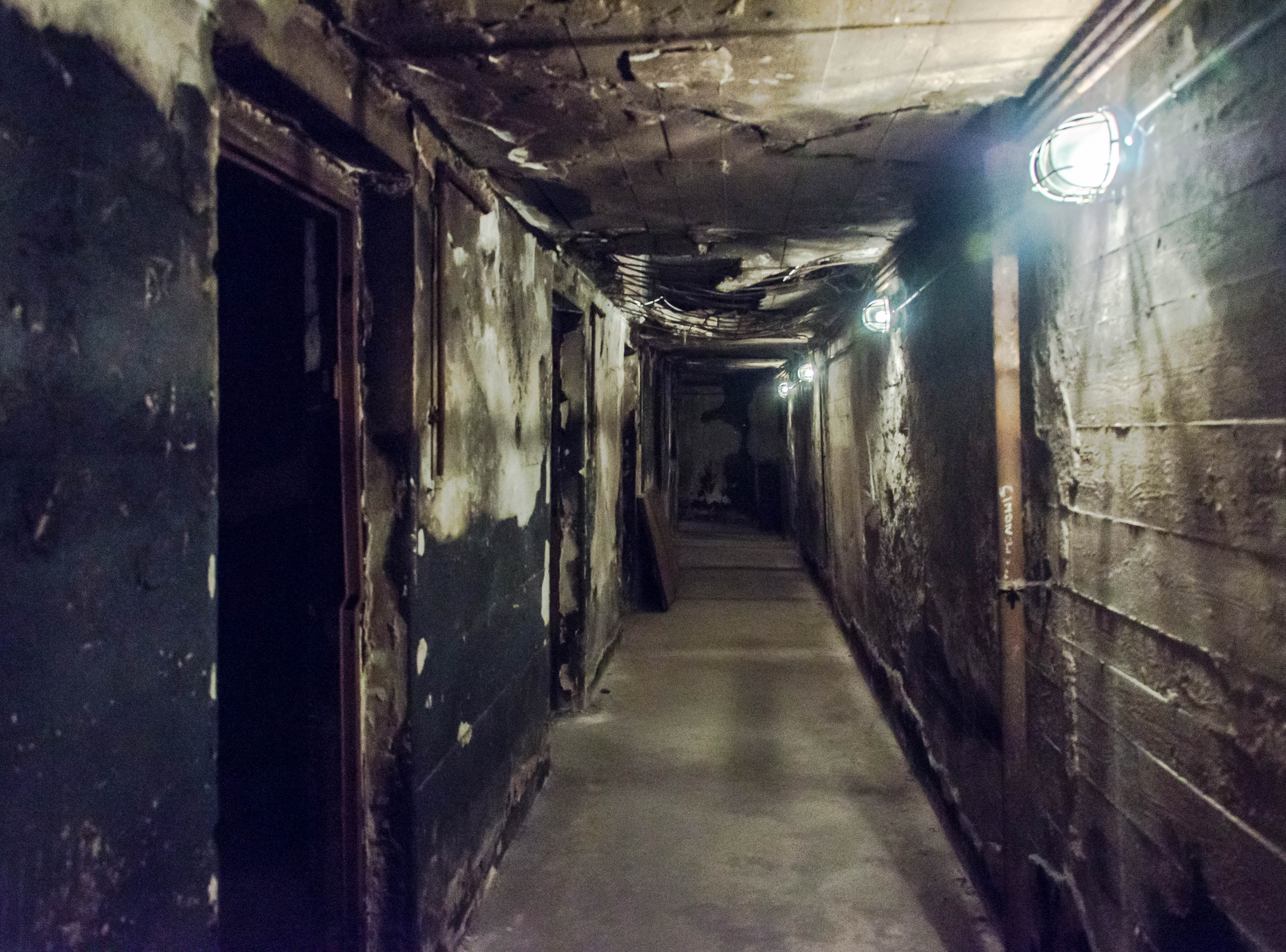 Flughafen Tempelhof